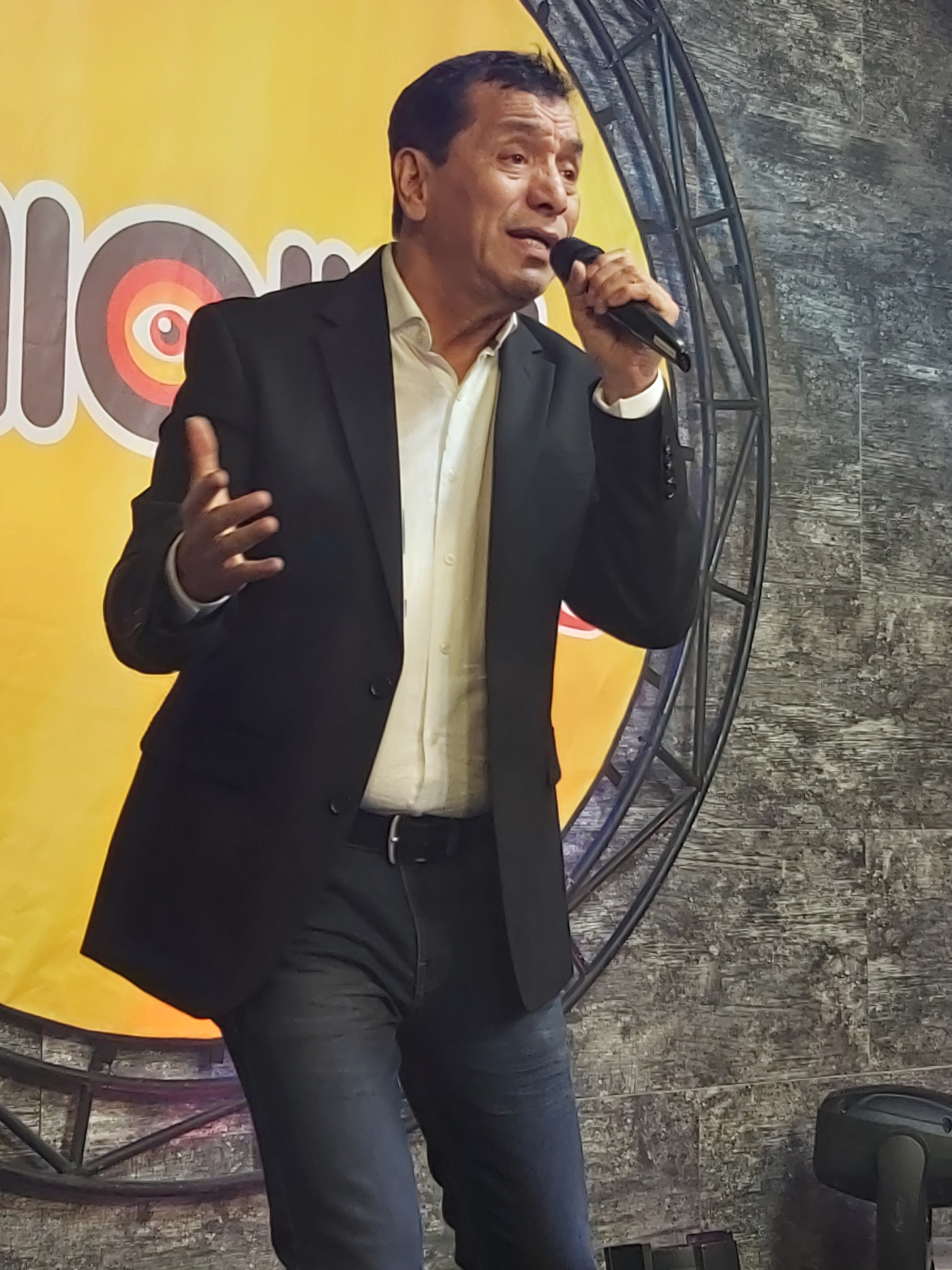 Edhisson, cantautor ecuatoriano en 2019.